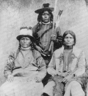 Photos of Paiutes circa 1880